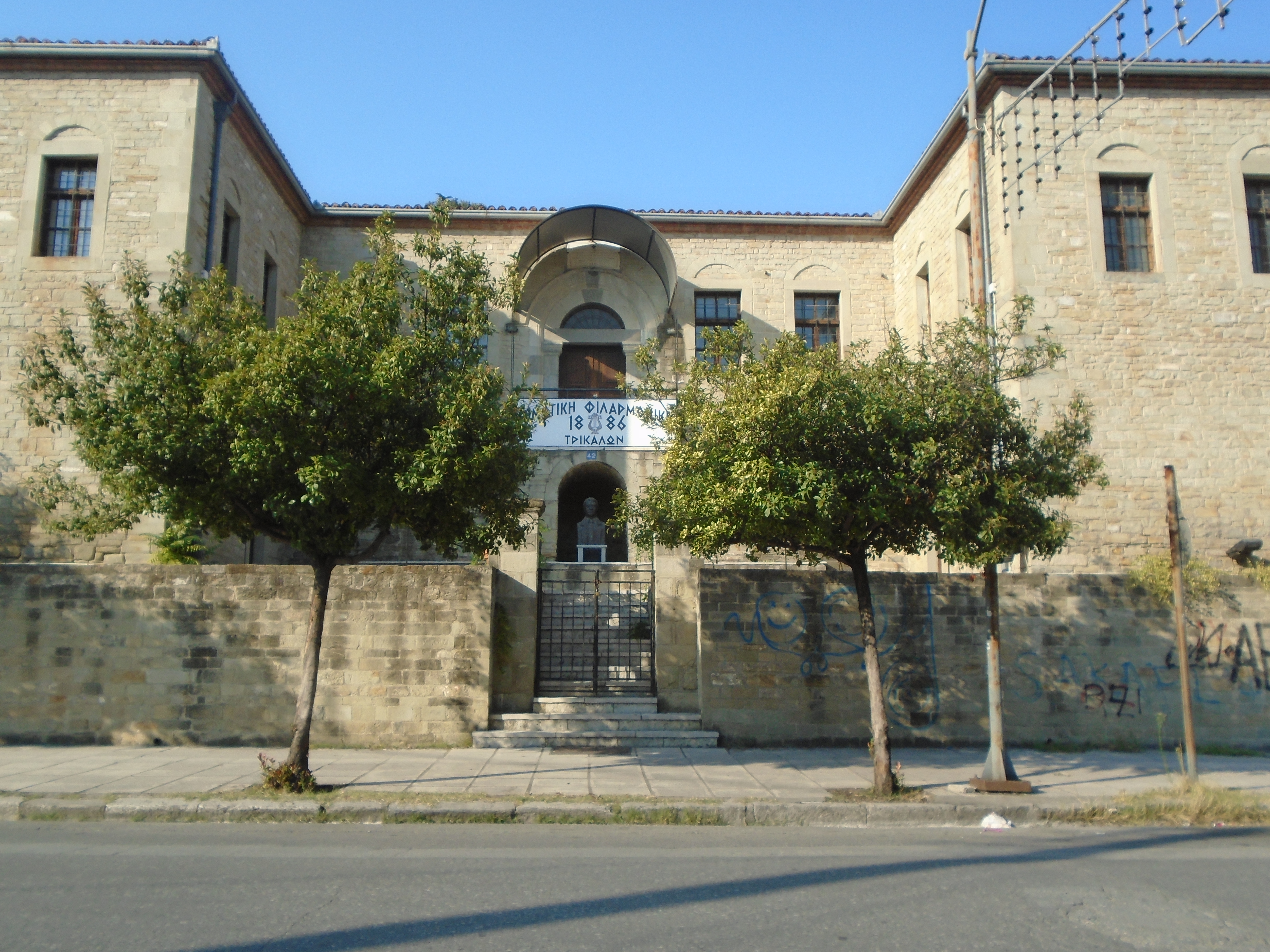 Δωροθέα Σχολή Τρικάλων«Δωροθέα Σχολή Τρικάλων»